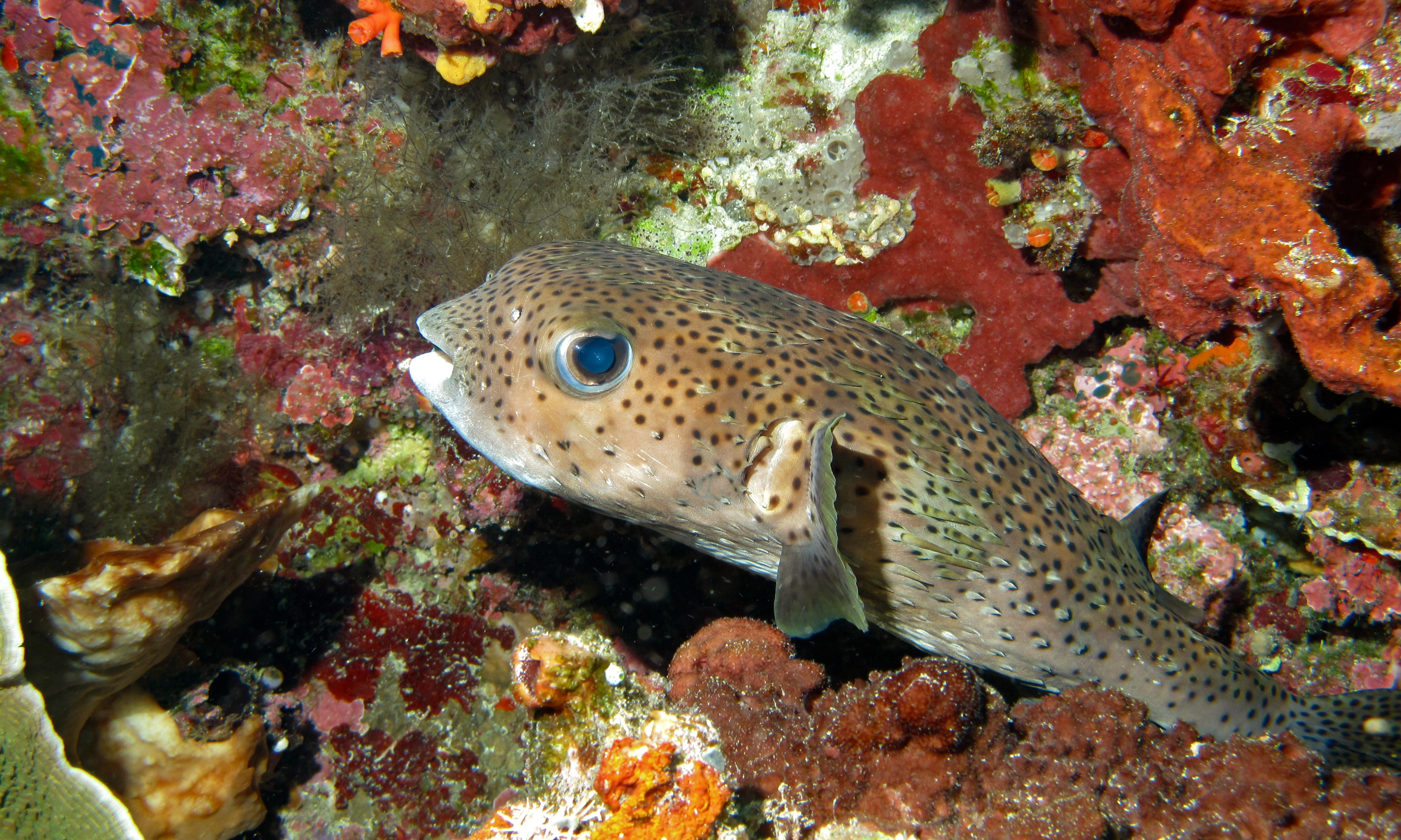 Likuan I, Bunaken Island, Sulawesi, INDONESIA